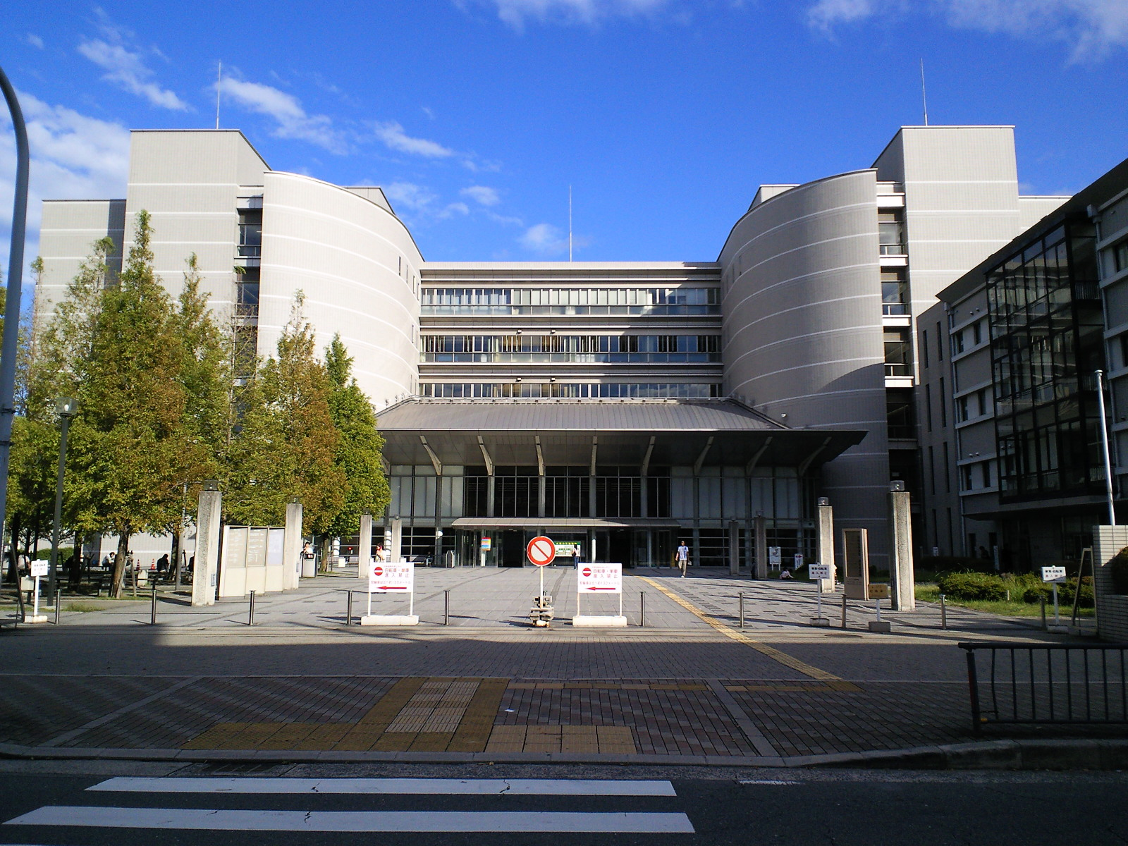 門真運転免許試験場（大阪府門真市） 本館正面